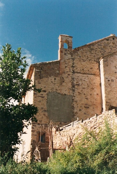 Iglesia de Segart por detrás